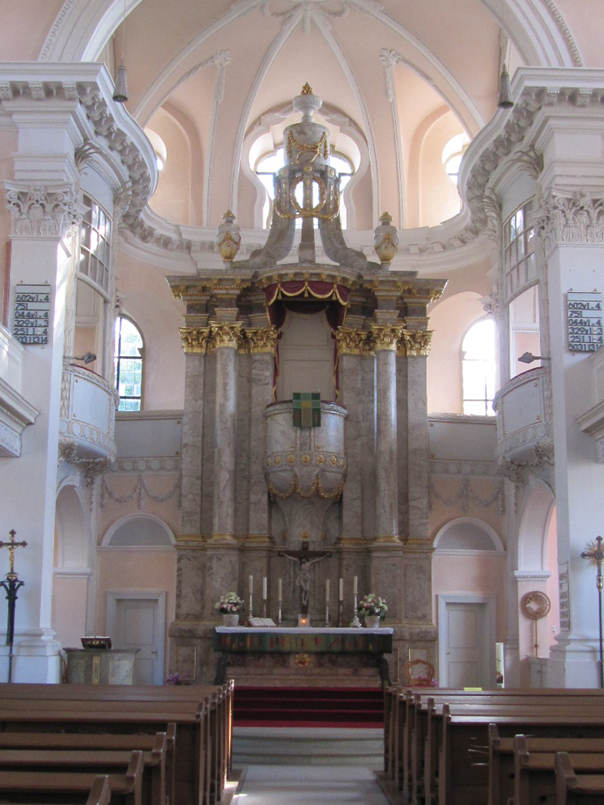 Kanzelaltar in der evangelisch-lutherischen Grafschaftskirche St. Johannis von Castell (Unterfranken)